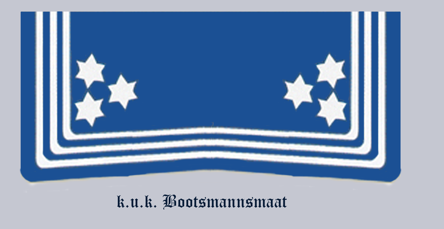 Bootsmannsmaat der k.u.k. Kriegsmarine ohne NATO Bezeichnung